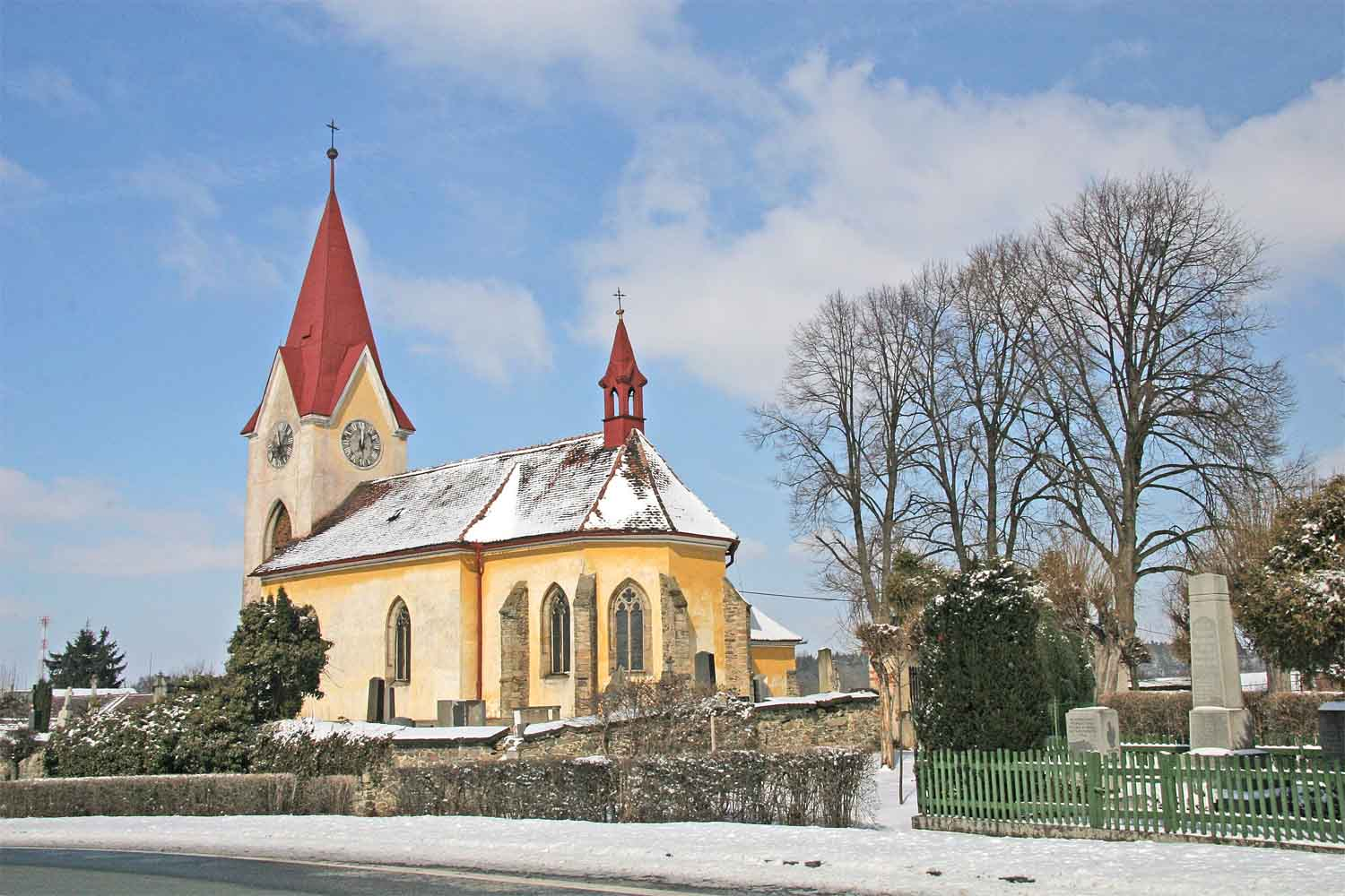 Pozdně gotický kostel Všech Svatých ve Stojicích